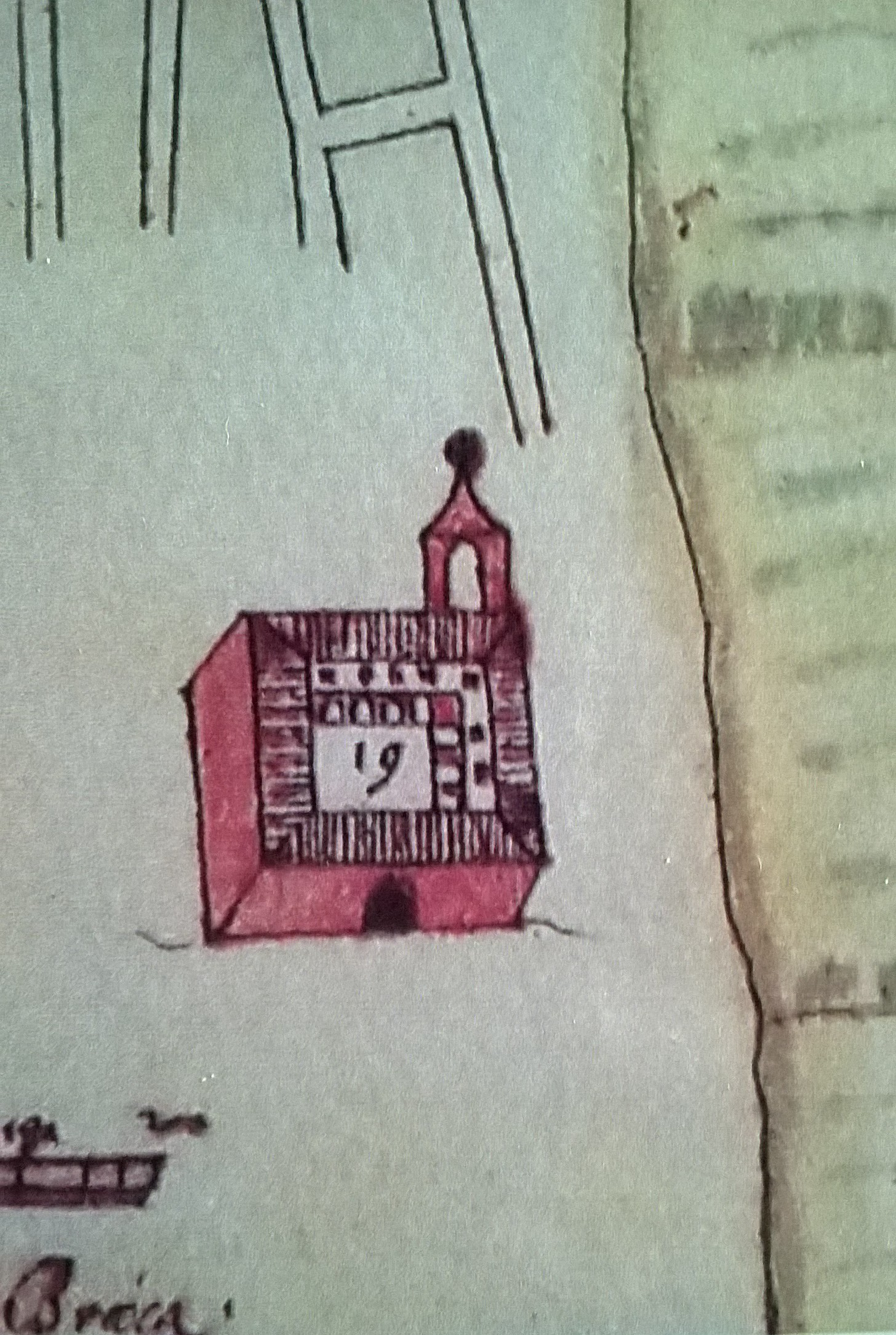 "(...) N.º 19 Most.º de São Gonçalo de Freiras - (...)" (detalhe) in "Castelo de São Filipe do Monte Brasil da Ilha Terceira", s.a., s.d. (início do séc. XVII). Acervo: ANTT, Casa de Cadaval, 29.